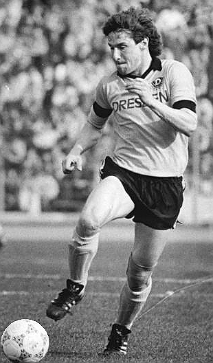 Title: BFC Dynamo - SG Dynamo Dresden 1:0 Factual corrections and alternative descriptions are encouraged separately from the original description. Additionally errors can be reported at this page to inform the Bundesarchiv. Original historic description: ADN-ZB-Mittelstädt-6.4.88-A-Berlin: Fußball-Oberliga- BFC Dynamo - SG Dynamo Dresden 1:0- Der Berliner Angriffsspieler Andreas Thom (l.), der vor 24 000 Zuschauern den einzigen Treffer erzielte, im Zweikampf mit Gästeverteidiger Andreas Trautmann.